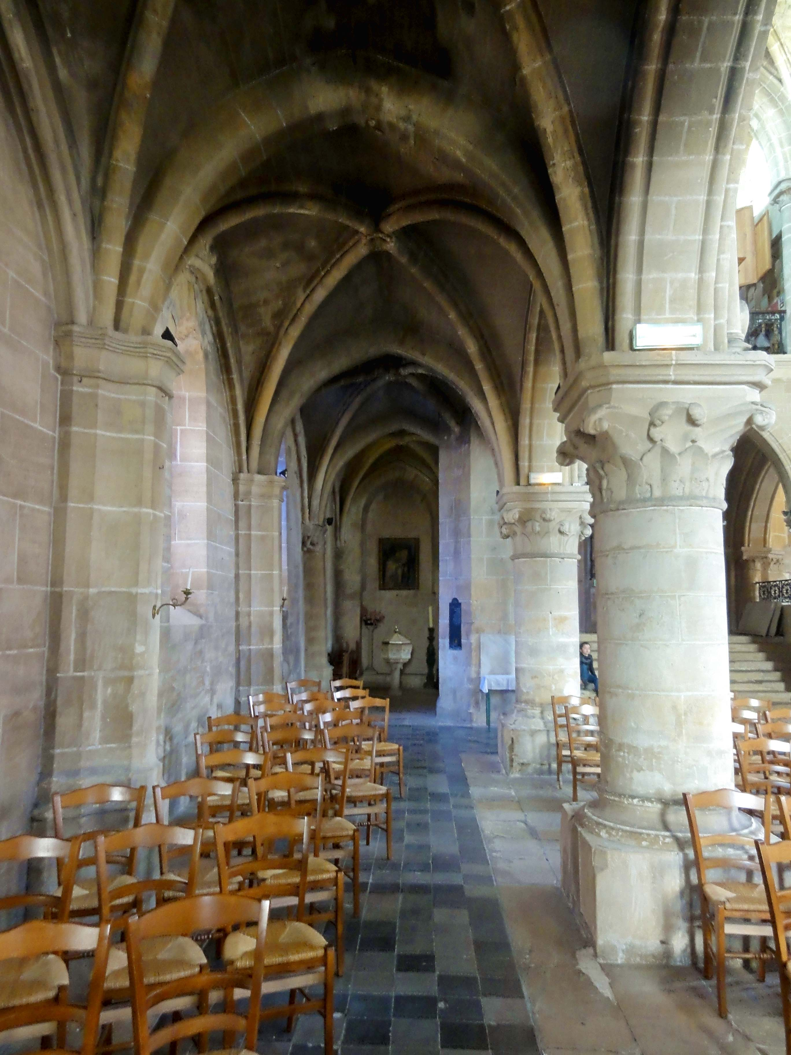 Intérieur de l'église - voir titre.